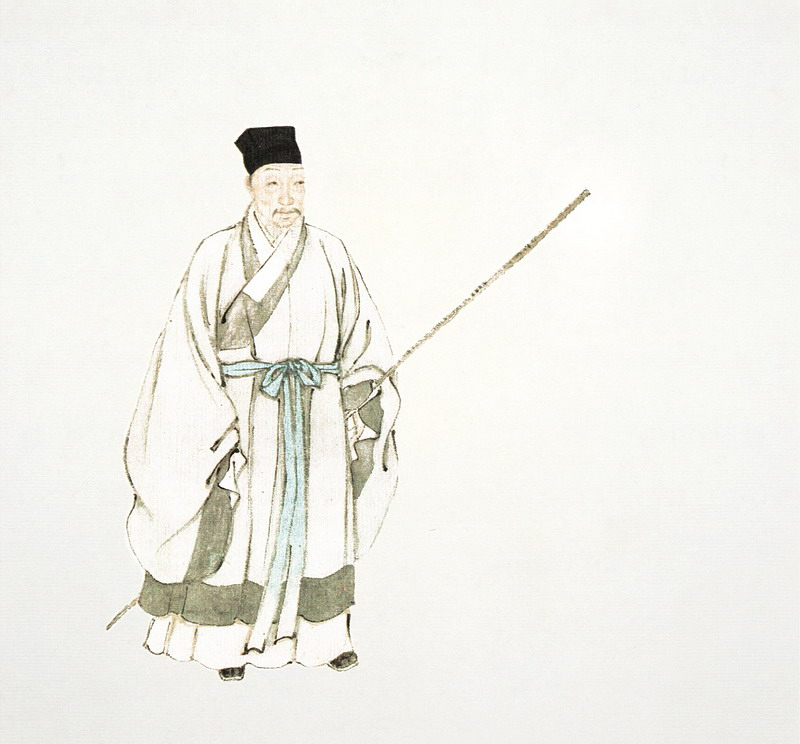 秦昌遇，字景明，号广野道人，松江府上海县人，明初秦裕伯裔孙。以医闻名。